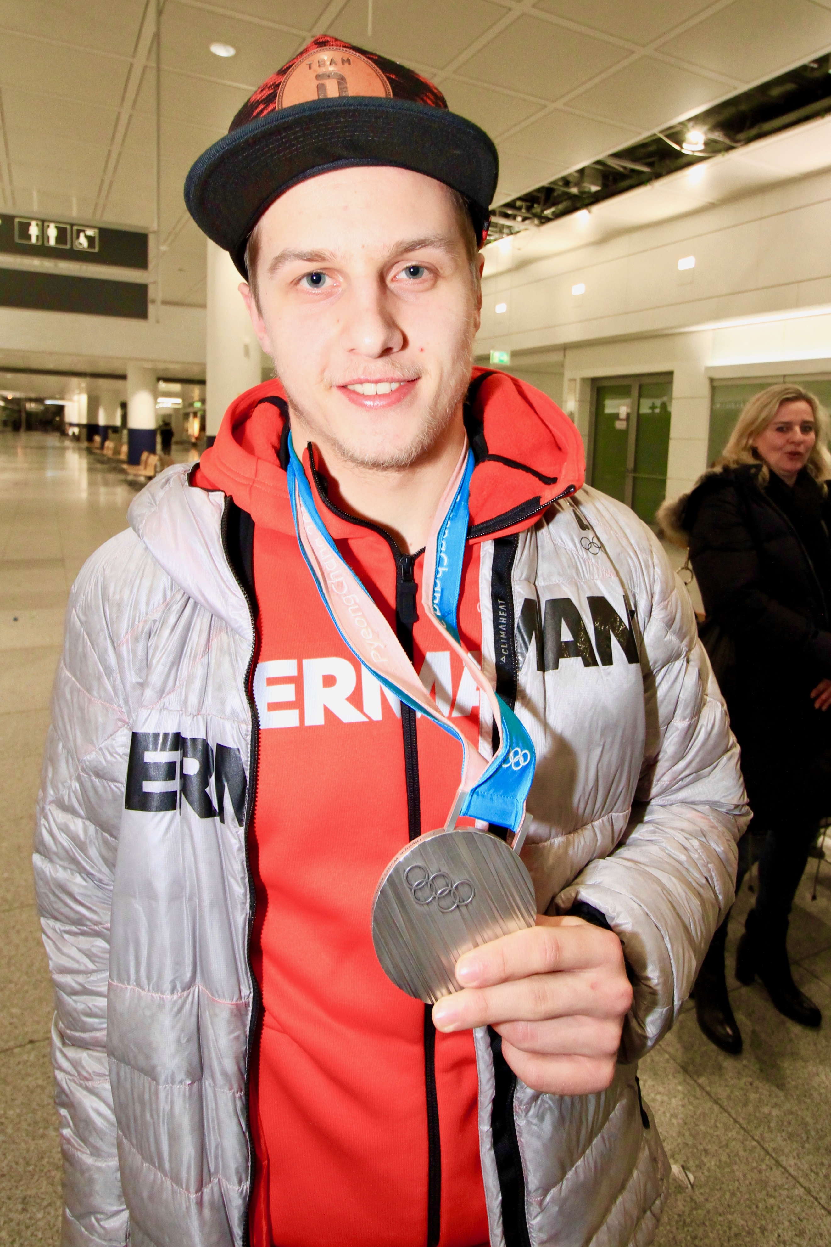 Dominik Kahun bei Ankunft mit Silbermedaille.